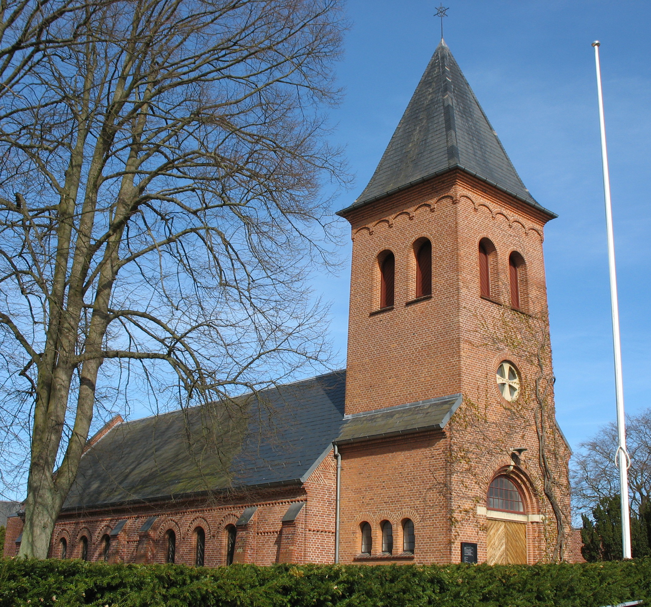 Hillerød Kirke